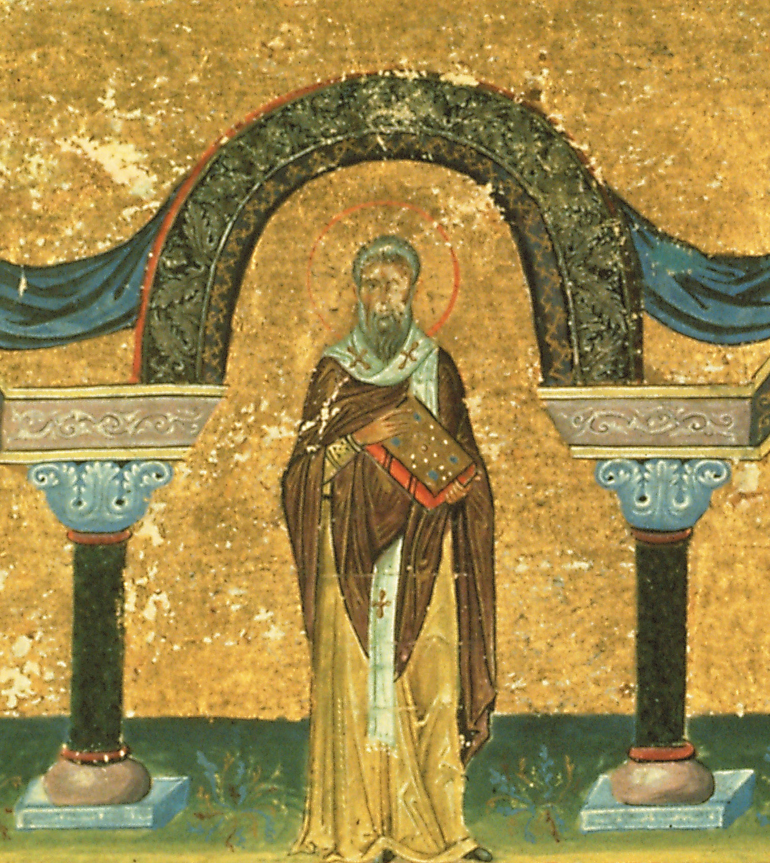 Агапит